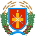 Герб Томаківськогого району